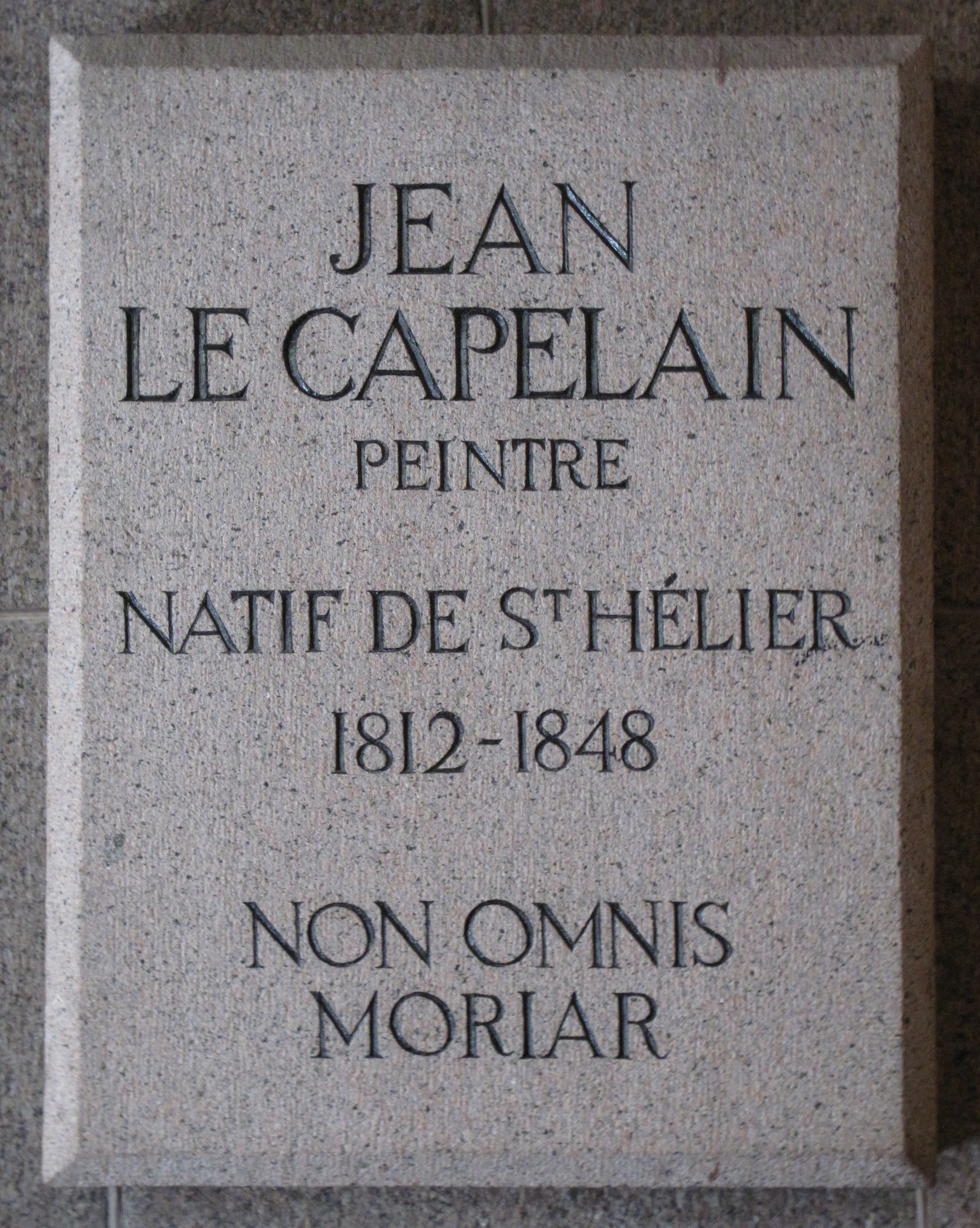 Nrf: êcritchieau, Jean Le Capelain, dans l'églyise dé Saint Hélyi, Jèrri